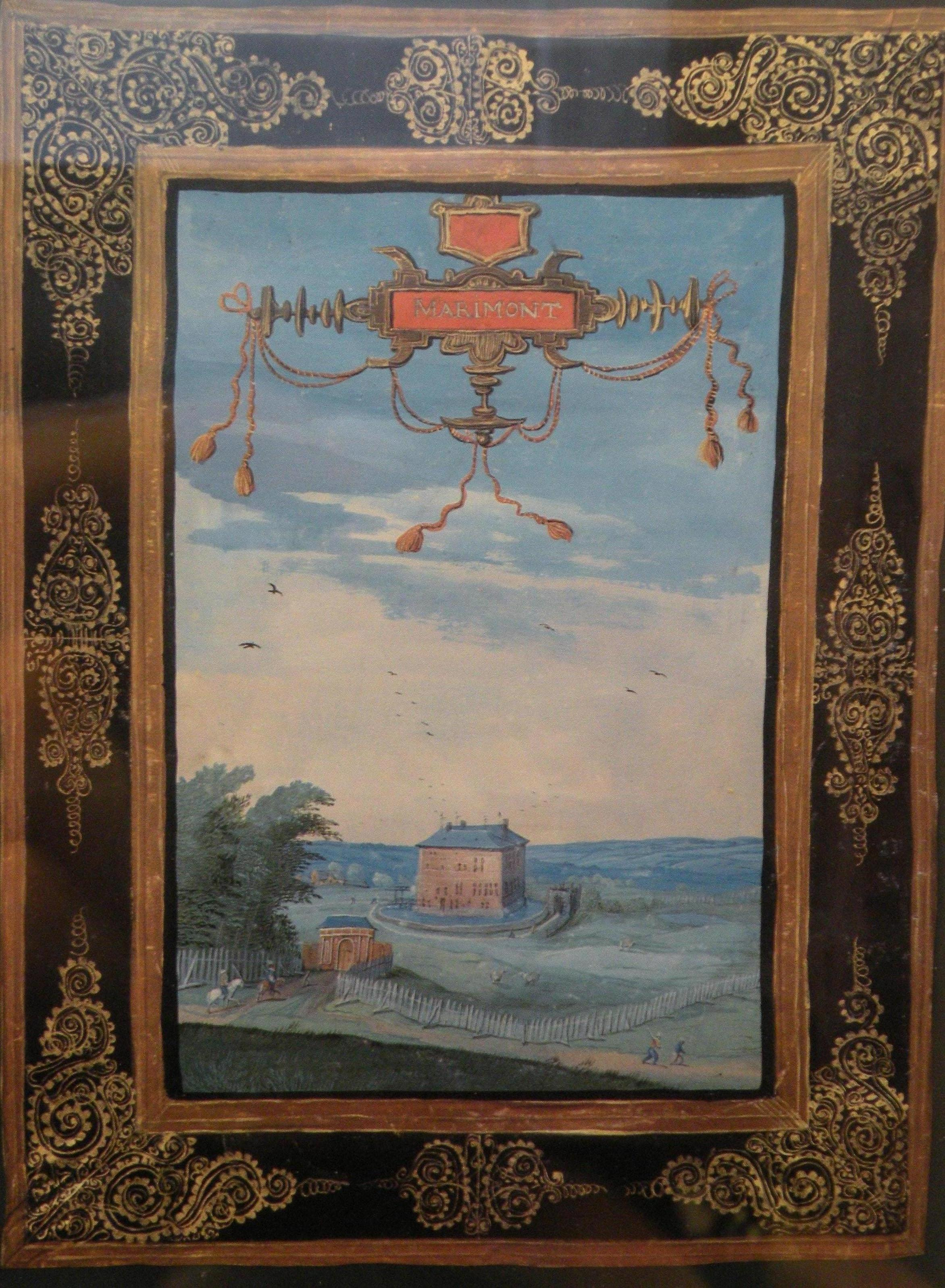 tableau du pavillon de chasse de marie de hongrie, mariemont, belgique au musée de mariemont